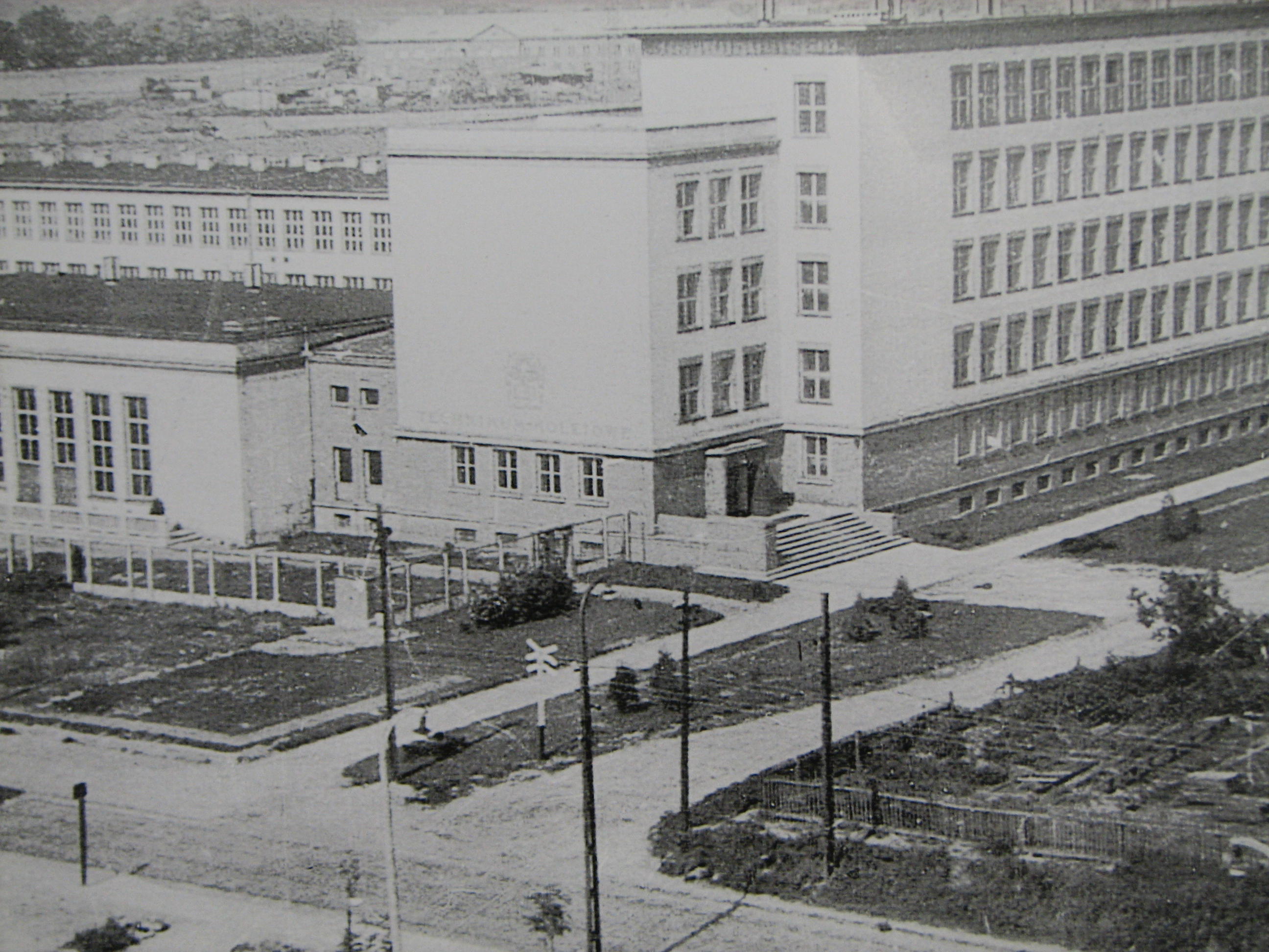 Technikum nr 7 w Warszawie